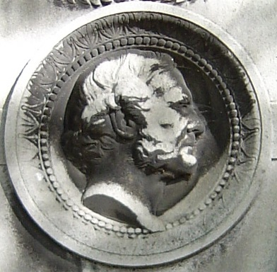 Détail de : File:Duc, Joseph-Louis.JPG